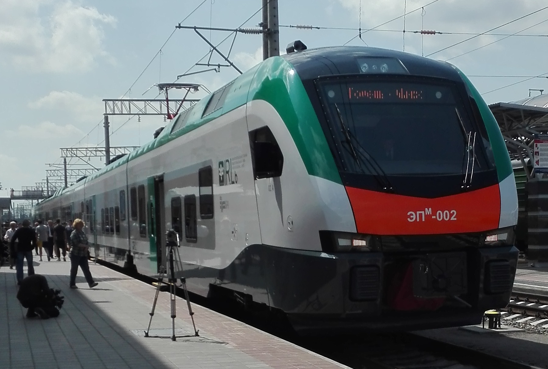 электричка эксплуатирующаяся на участке гомель-минск